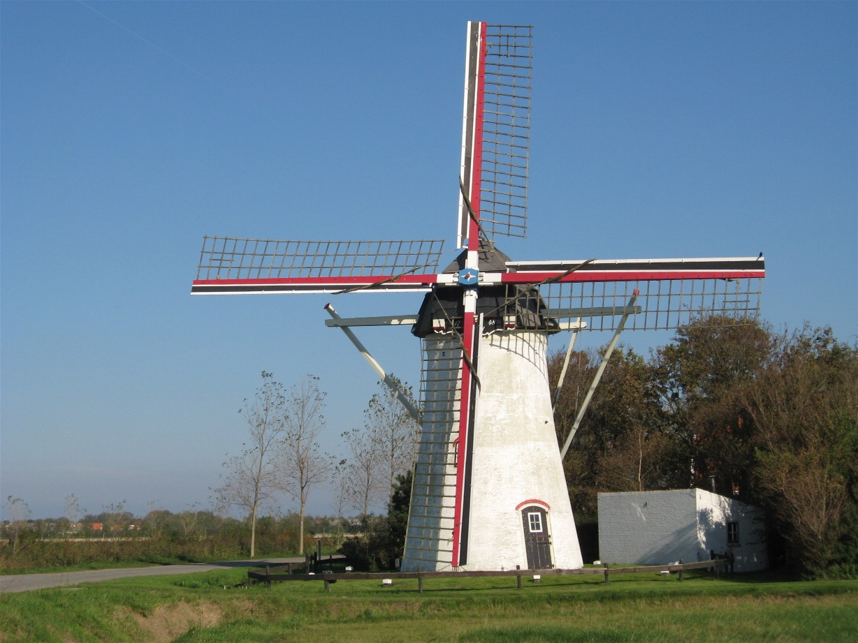 't Hert, mill in Ellemeet